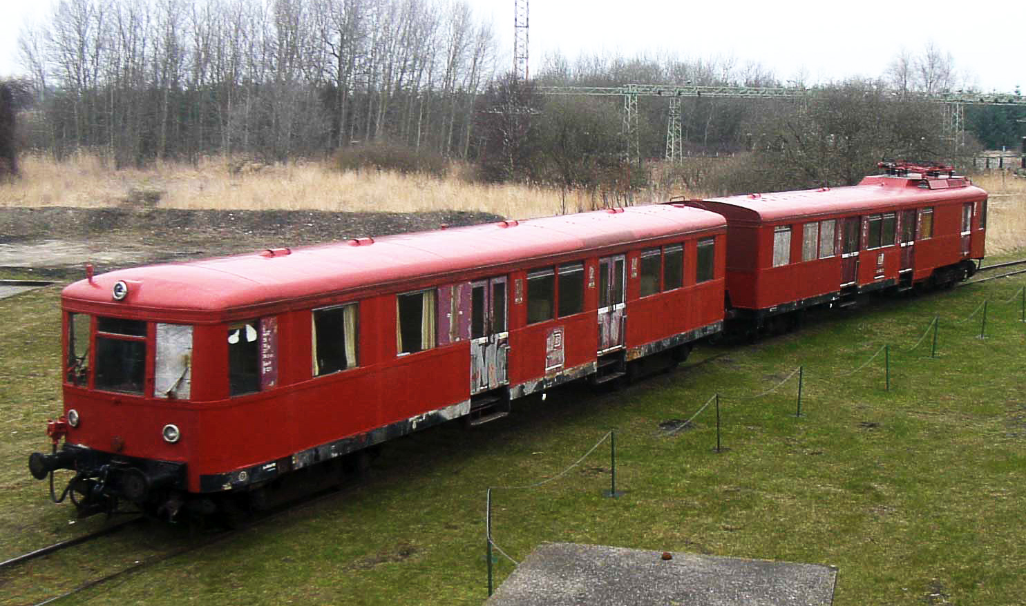 S-Bahn im Museum Peenemünde; Angestellte des Museums haben der Veröffentlichung unter freien Lizenzen zugestimmt